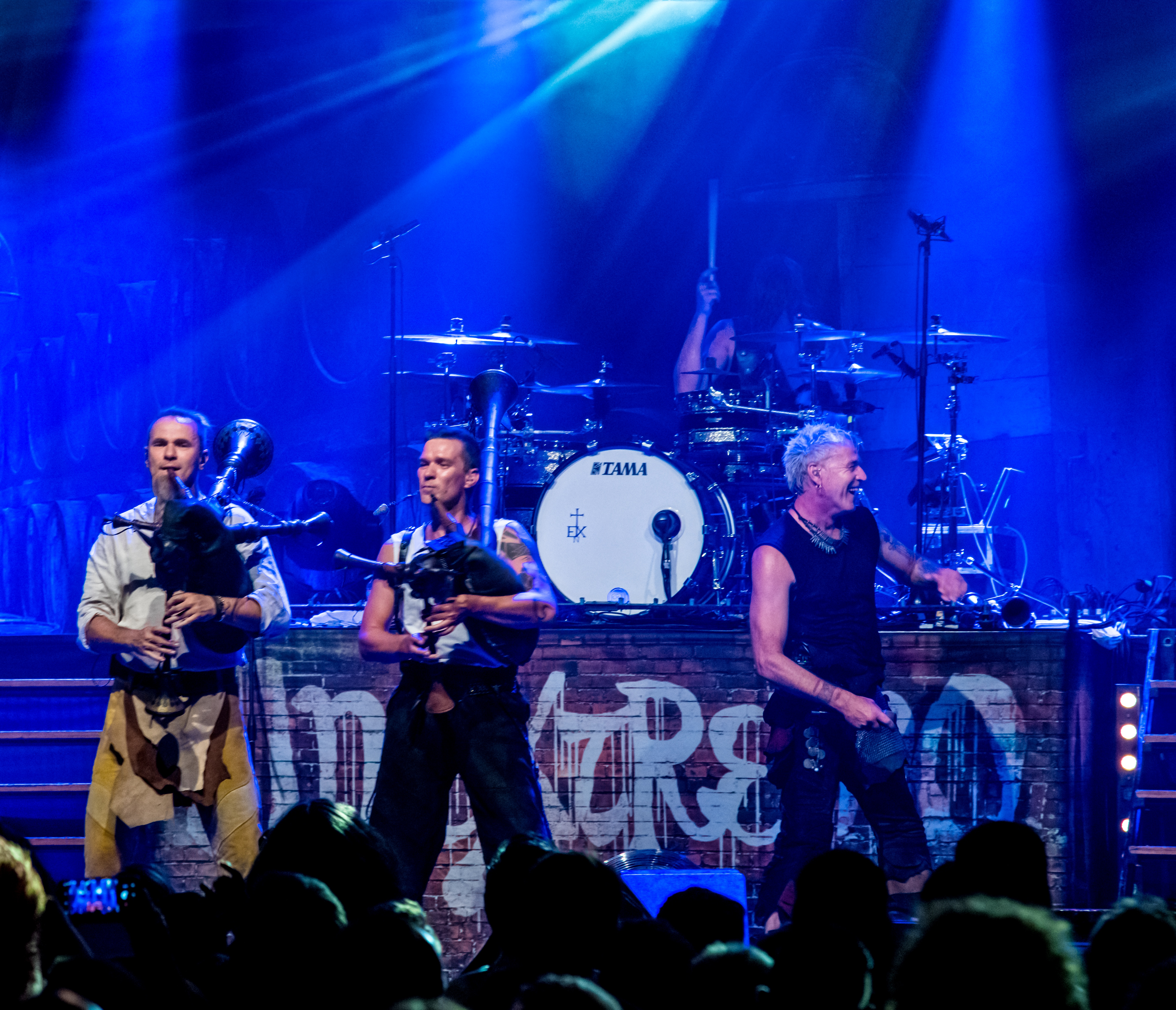 Bilder vom Zelt Musik Festival 2018 in Freiburg im Breisgau In Extremo am 29.07.2018 im Zirkuszelt